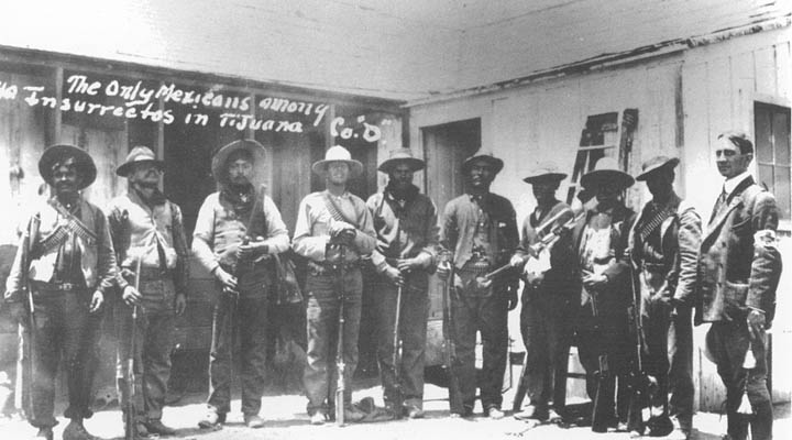 Rebeldes magonistas de origen mexicano que participaron en la Segunda División del Ejército liberal que capturó Tijuana en 1911.